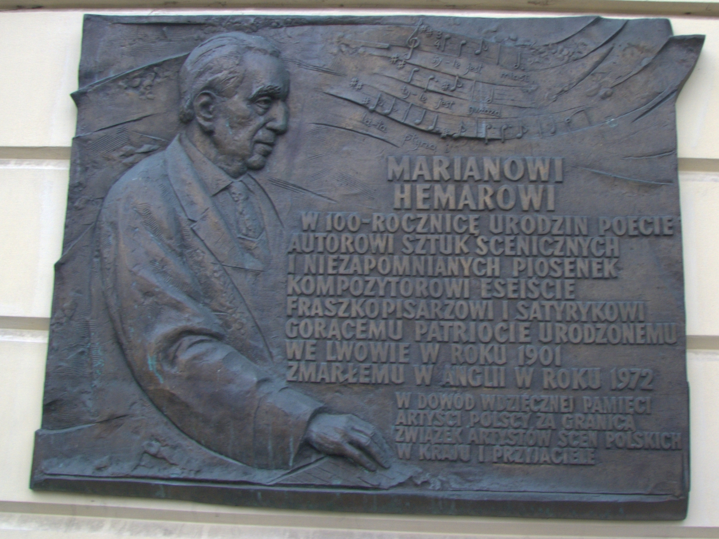 Warszawa, pablica poświęcona Marianowi Hemarowi.